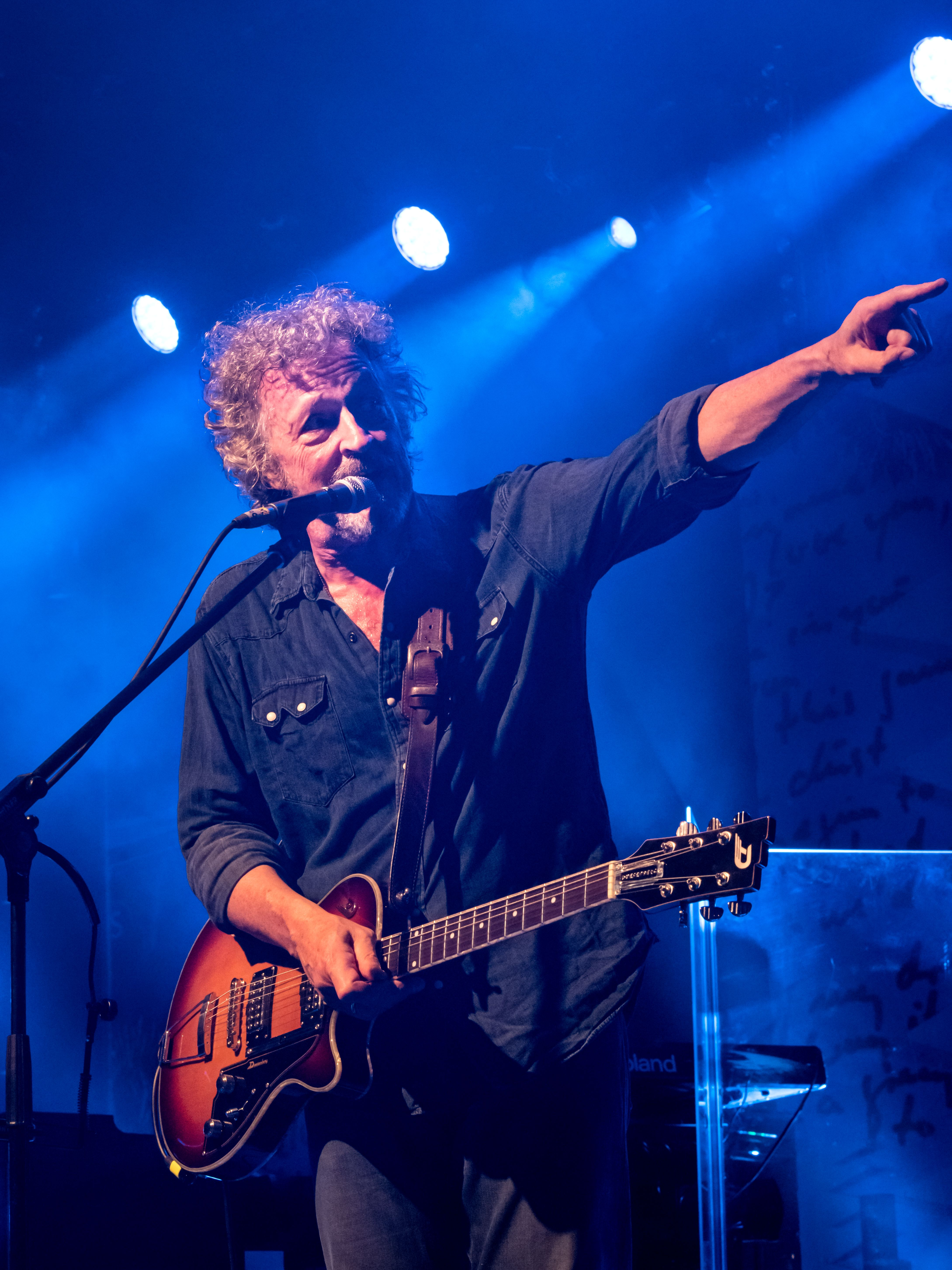 Bilder vom Zelt Musik Festival 2016 in Freiburg im Breisgau " Wolfgang Niedecken’s BAP" kurz BAP